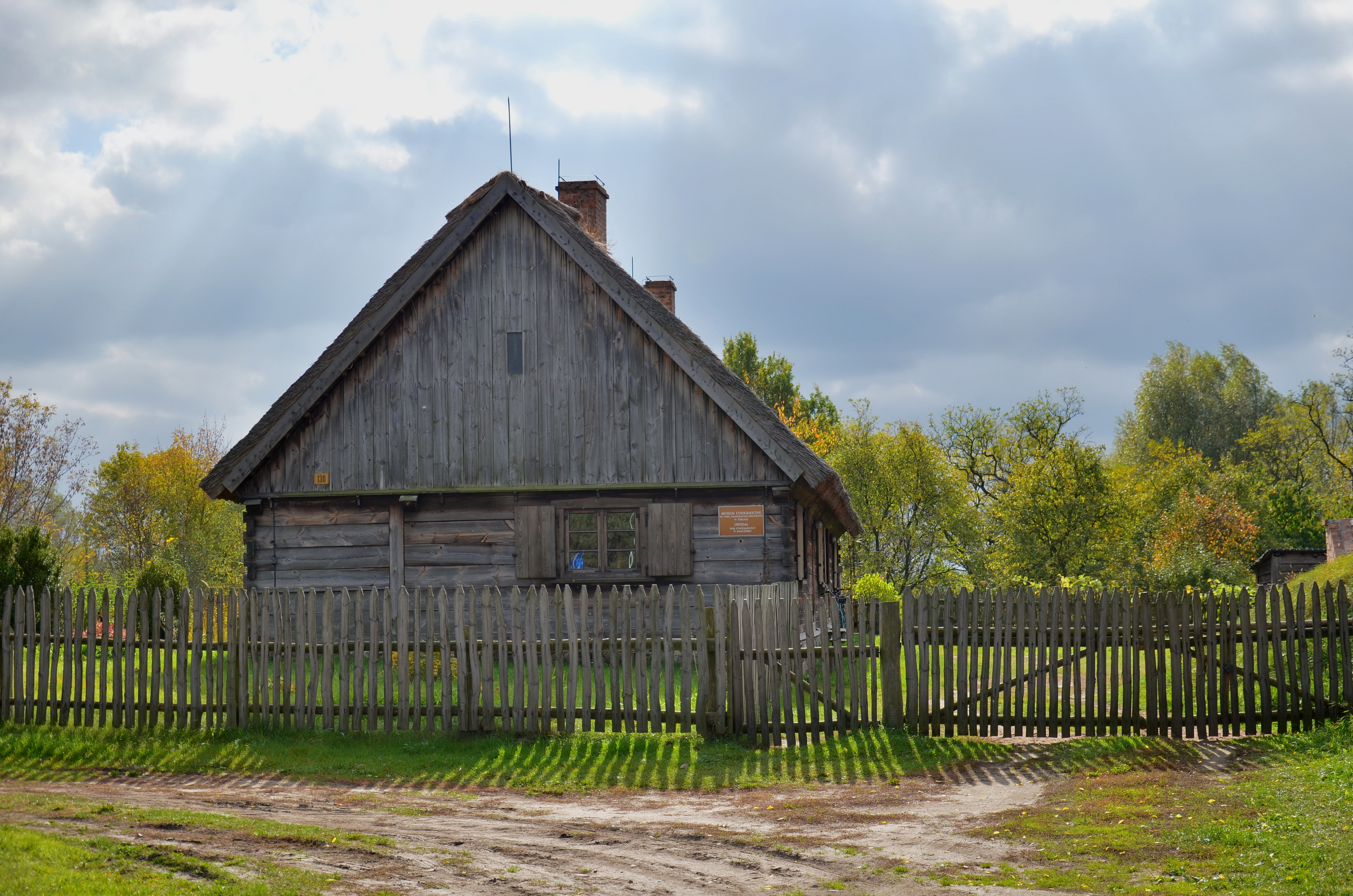 Zagroda Rybacko-Rolnicza w Kaszczorku, Oddział Muzeum Etnograficznego im. Marii Znamierowskiej-Prüfferowej w Toruniu